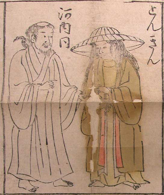 萬國人物圖之安南人。